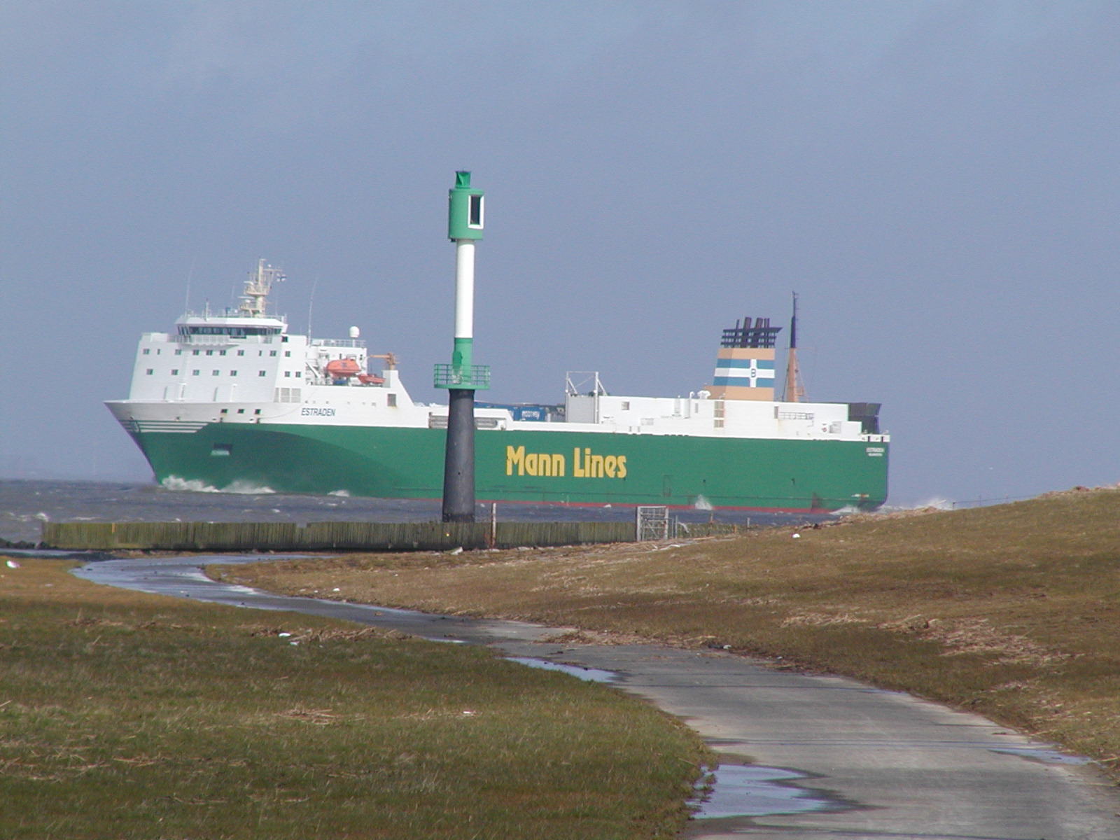 Gut zu sehen: wie dicht die Estraden, ein LKW RoRo Schiff der Mann Lines, am Deich vorbei fährt